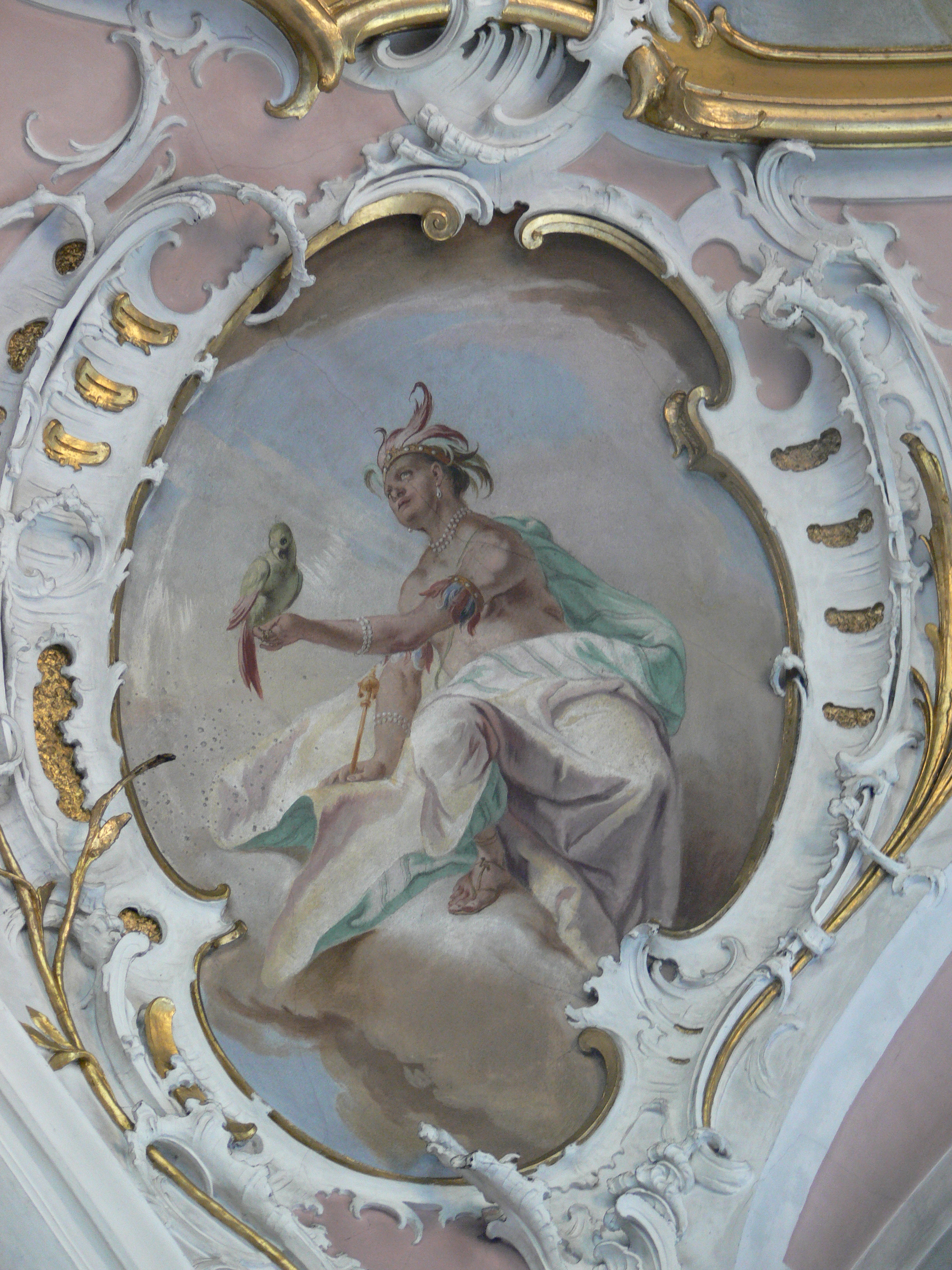 Pfarrkirche St. Johannes Baptist (ehem. Klosterkirche Unserer Lieben Frau), Baindt, Landkreis Ravensburg Deckenfresko im Chor, Zyklus "Die vier Erdteile" von Franz Martin Kuen, 1764: Amerika